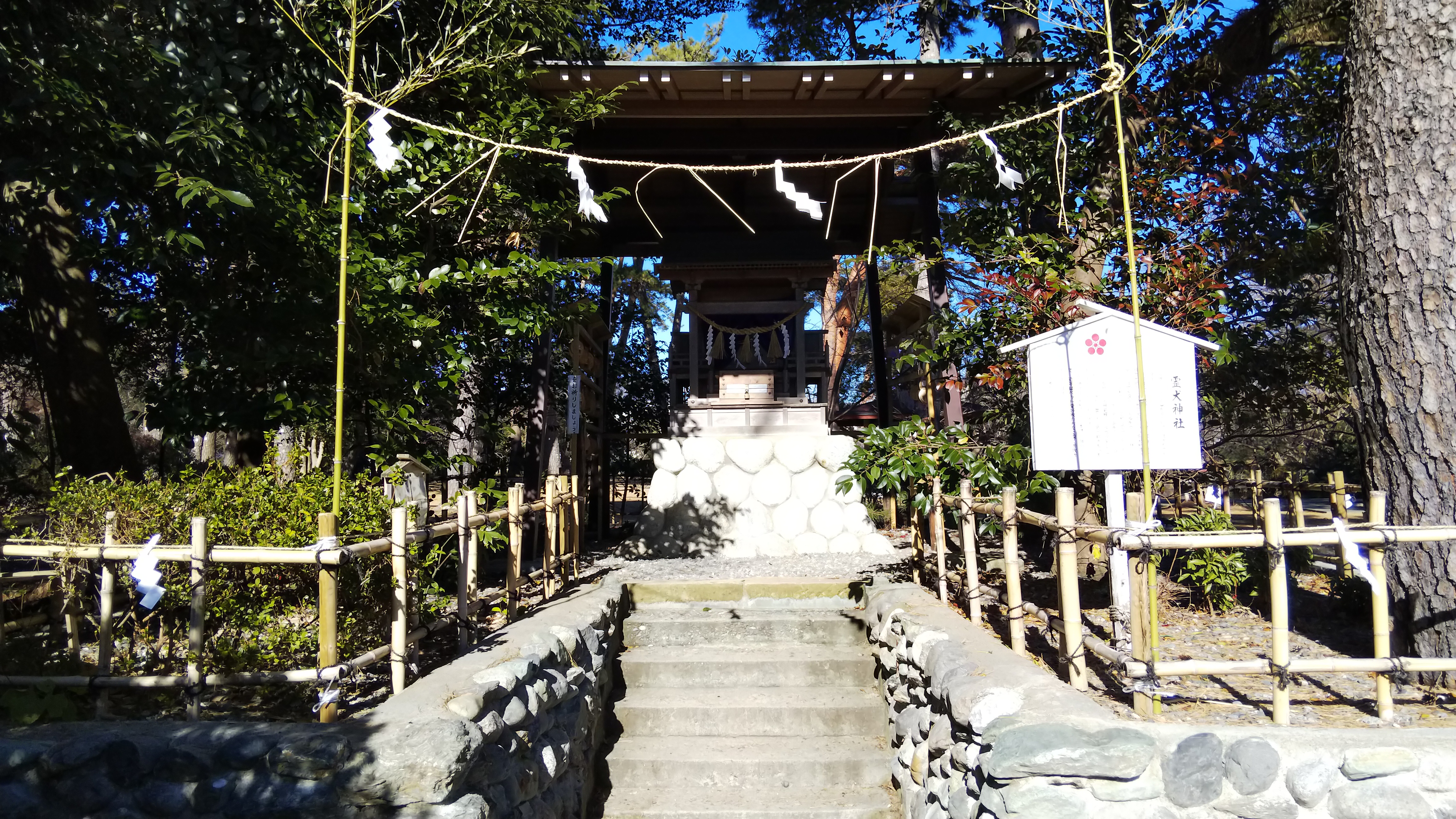 霊犬神社（矢奈比売神社境内社）